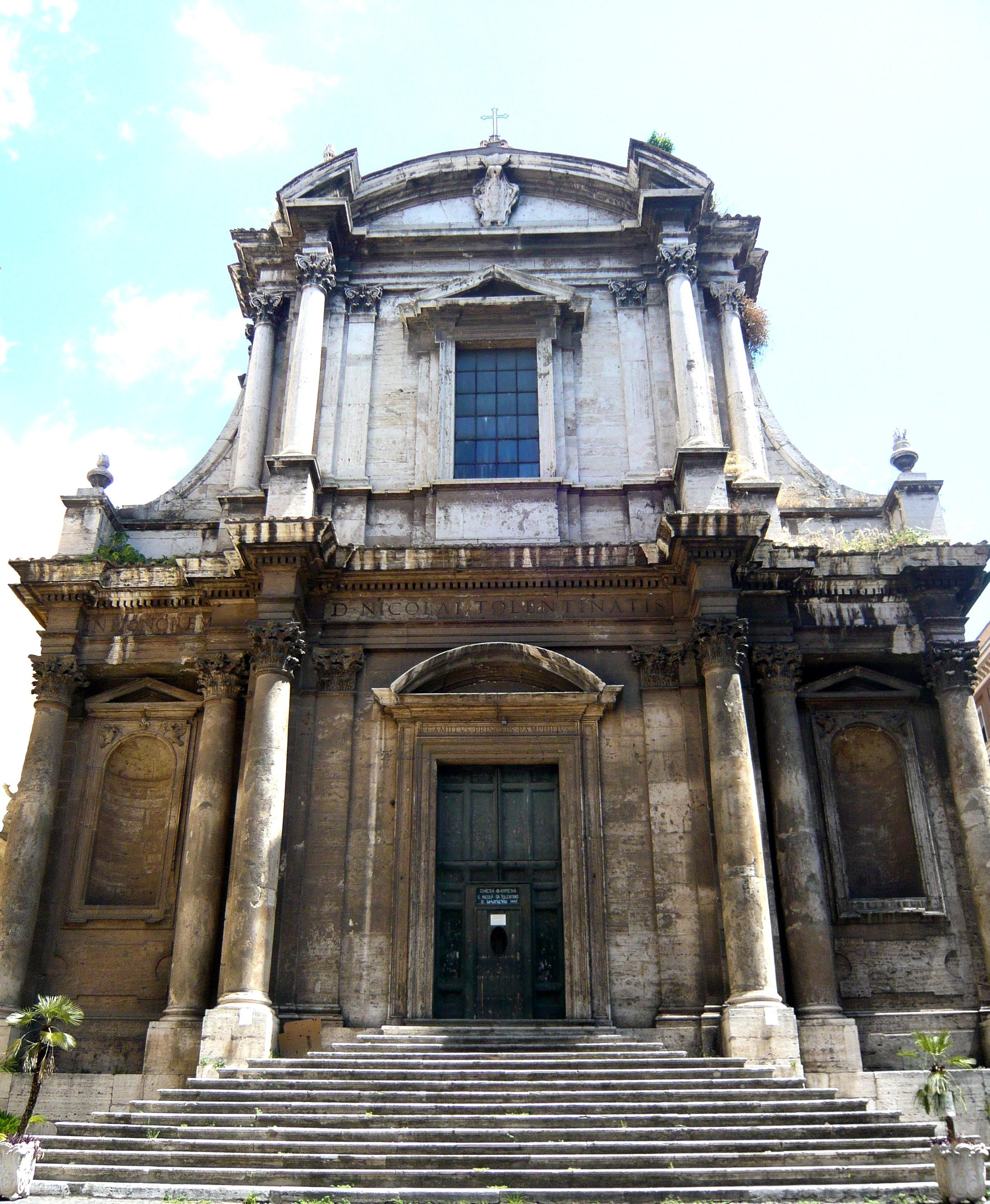 Facade de l'église Saint Nicolas de Tolentino, Rome